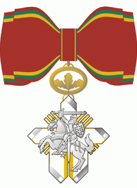 Орден „За заслуги перед Литвой“